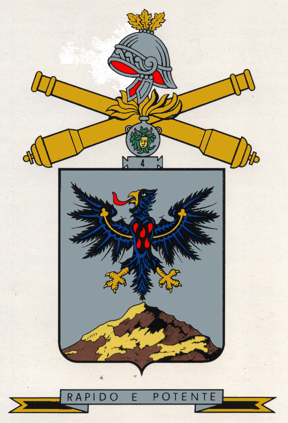 Stemma del 4º Rgt artiglieria (anno 1974)